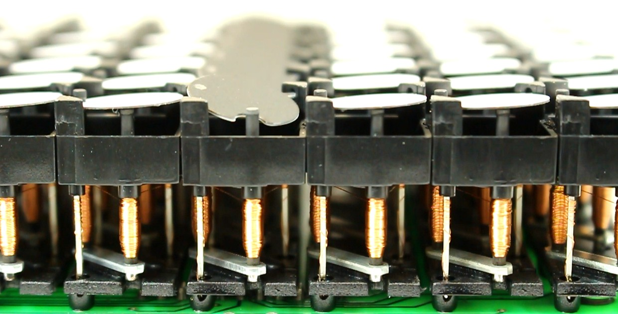 Flipdot-Matrix